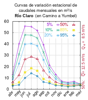 Curvas de variación estacional del río Claro (Laja) en Camino a Yumbel. # Dirección General de Aguas # Diagnóstico y clasificación de los cursos y cuerpos de agua según objetivos de calidad. Cuenca del río Biobío. # Santiago de Chile # Ministerio de Obras Públicas (Chile) # 2004 # url: # urlarchivo: # Tabla 4.12: Estación Claro en camino Yumbel – Estación pág.83 mes 5% 10% 20% 50% 85% 95% abr 12.88 10.94 8.98 6.16 3.87 2.95 may 40.03 30.97 22.69 12.52 6.02 3.92 jun 55.79 48.16 39.86 26.68 14.94 10.07 jul 55.20 47.91 40.32 28.85 18.66 14.03 ago 51.86 45.44 38.35 26.84 16.18 11.54 sep 39.35 32.59 25.88 16.52 9.26 6.46 oct 21.28 18.21 15.07 10.50 6.72 5.18 nov 13.05 11.16 9.24 6.44 4.13 3.18 dic 7.14 6.31 5.50 4.37 3.49 3.16 ene 5.96 5.32 4.65 3.64 2.73 2.33 feb 6.82 5.83 4.92 3.79 3.07 2.83 mar 4.67 4.43 4.19 3.82 3.49 3.34 This plot was created with Gnuplot.